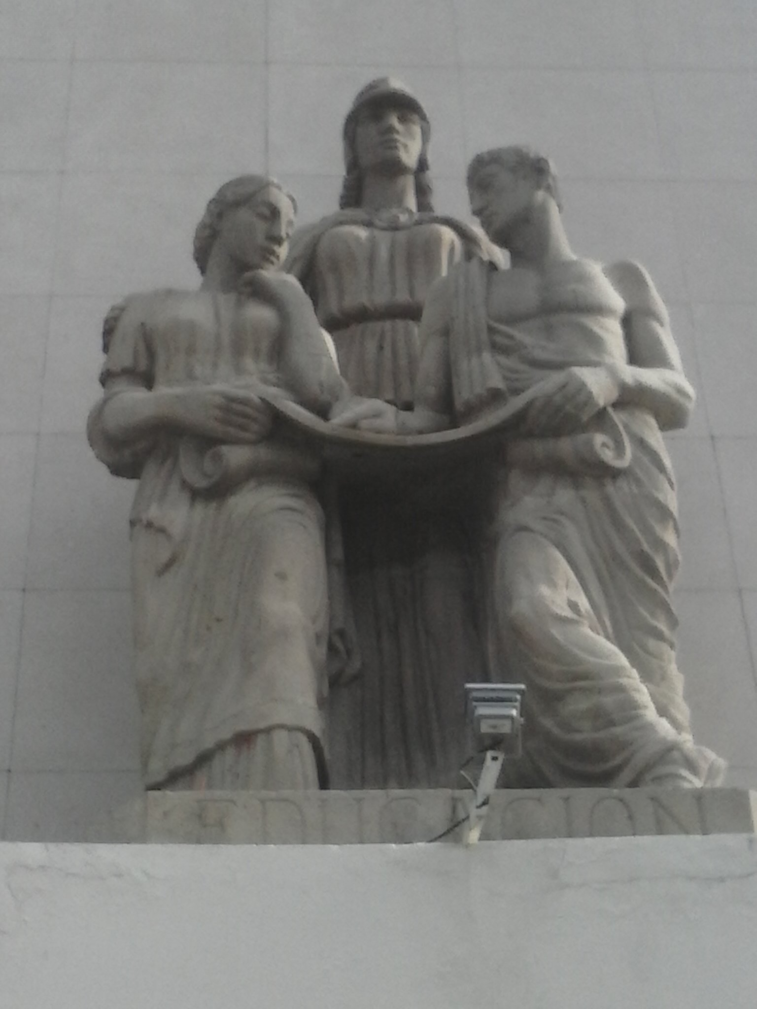 Palacio Federal construido en 1946, patrimonio de Torreón.